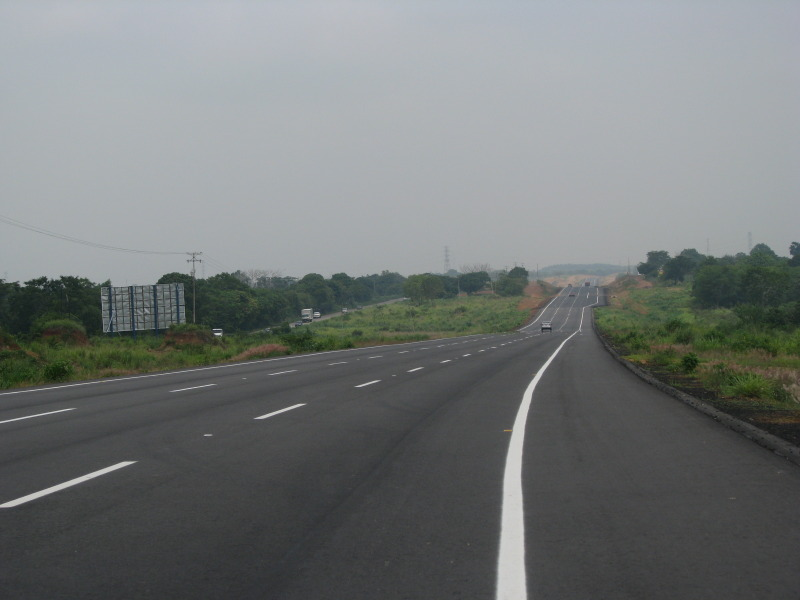 Autopista Lara-Zulia, o gran autopista de occidente a su paso por el municipio cabimas estado zulia, occidente de Venezuela